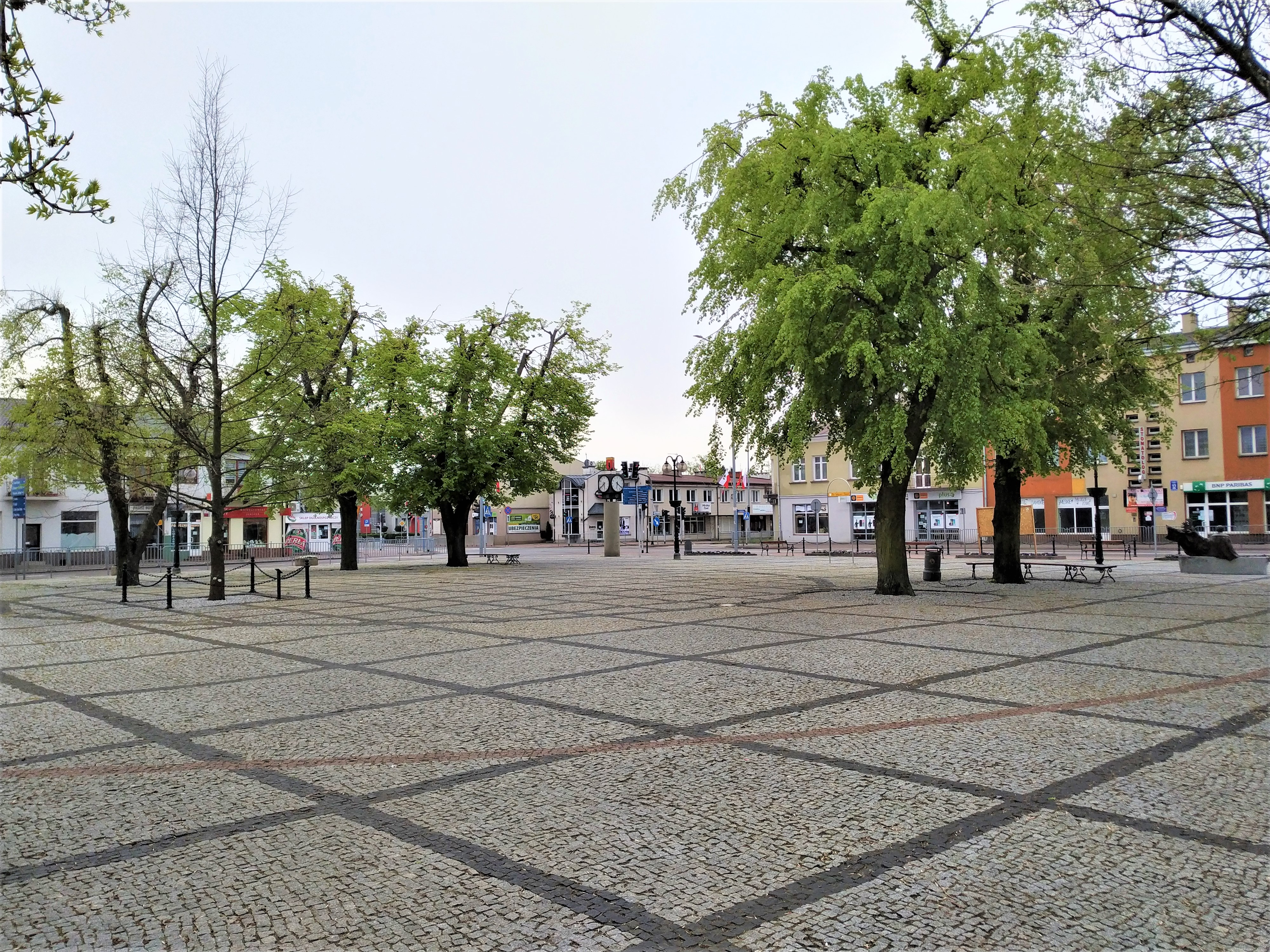 Plac Solidarności i Wolności w centrum Łukowa